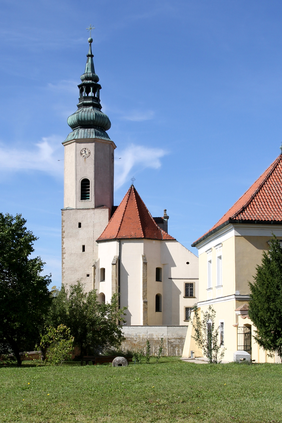 Die katholische Pfarrkirche hl. Agatha in der niederösterreichischen Gemeinde Hausleiten.